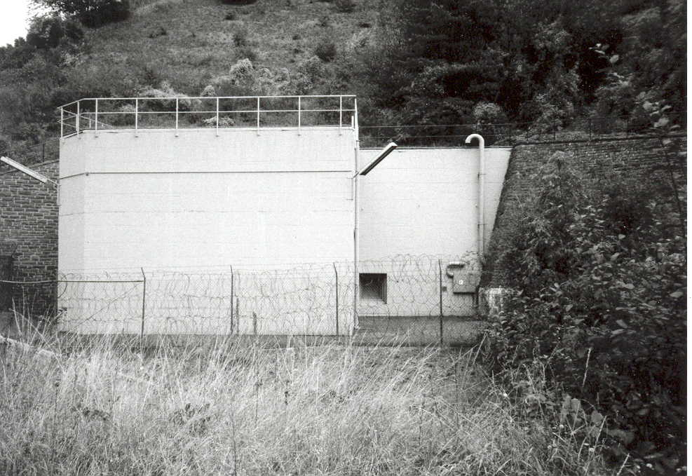 Einer der Eingänge des Regierungsbunkers, eigenes Bild, GNU FDL